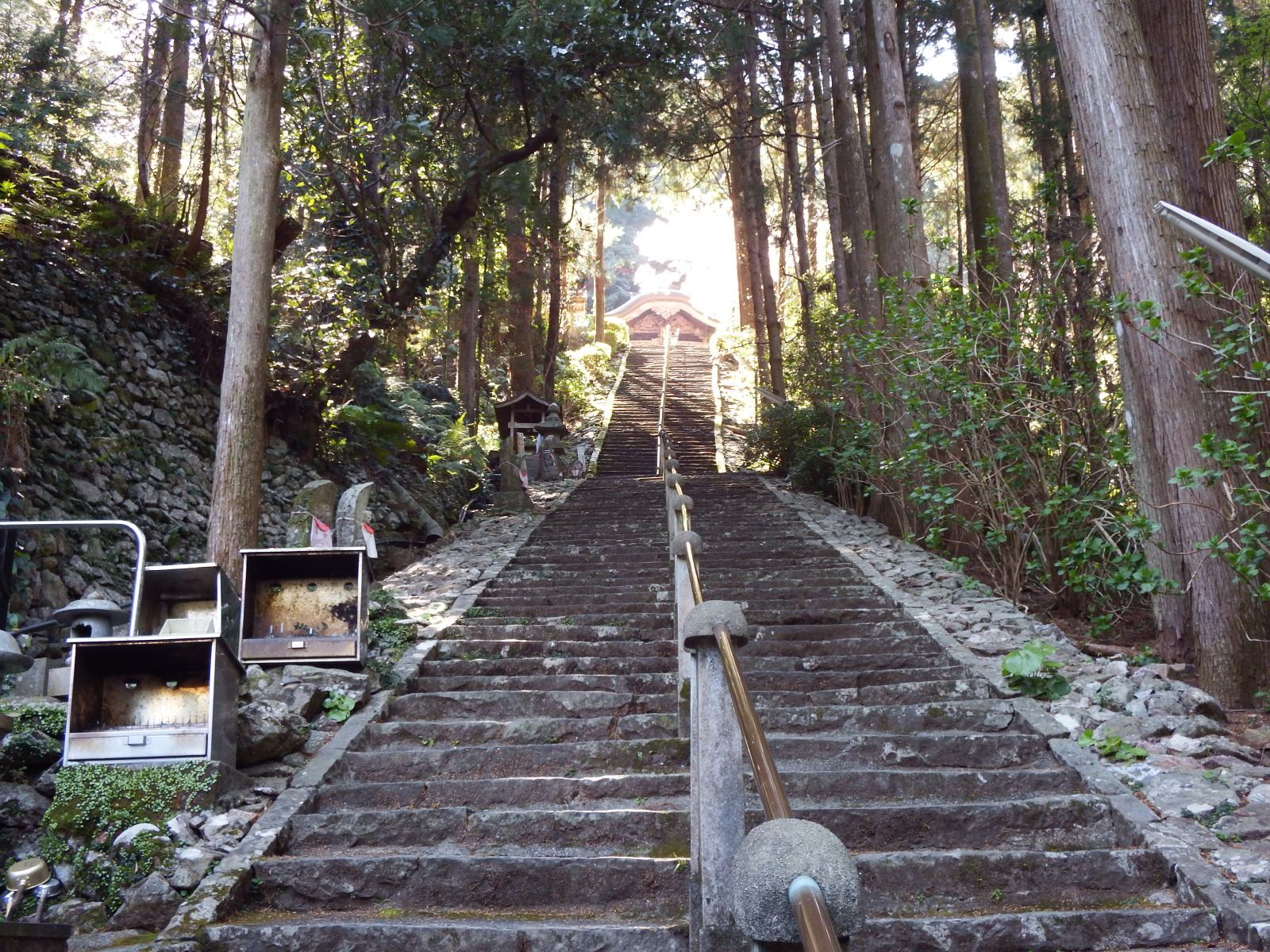 青龍寺 (土佐市)の参道